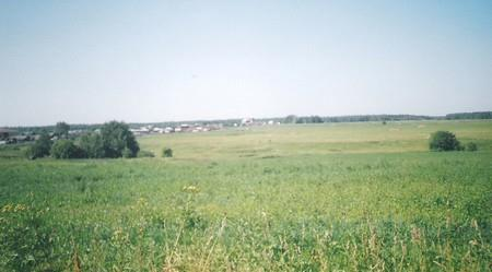 Окрестности села